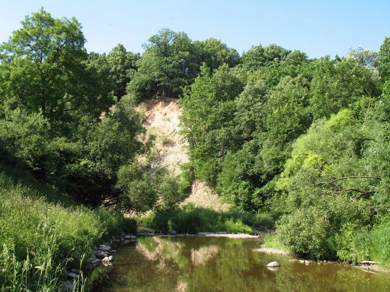 Jiesia, Jiesios kraštovaizdžio draustinis.